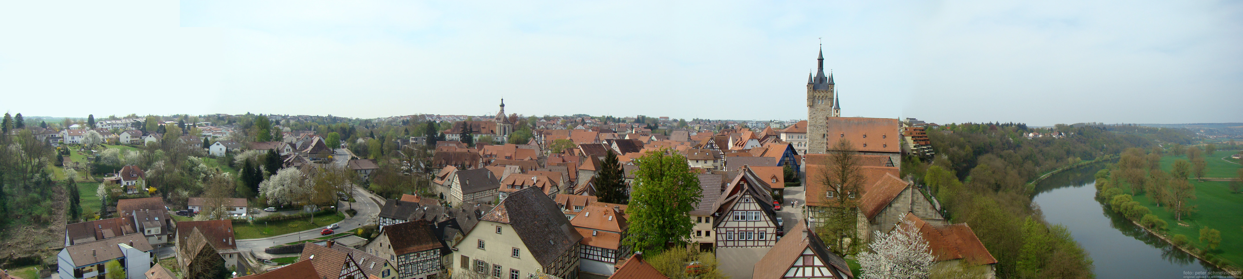 Bad Wimpfen, Panoramablick vom Roten Turm über Wimpfen am Berg, montiert aus fünf Einzelbildern